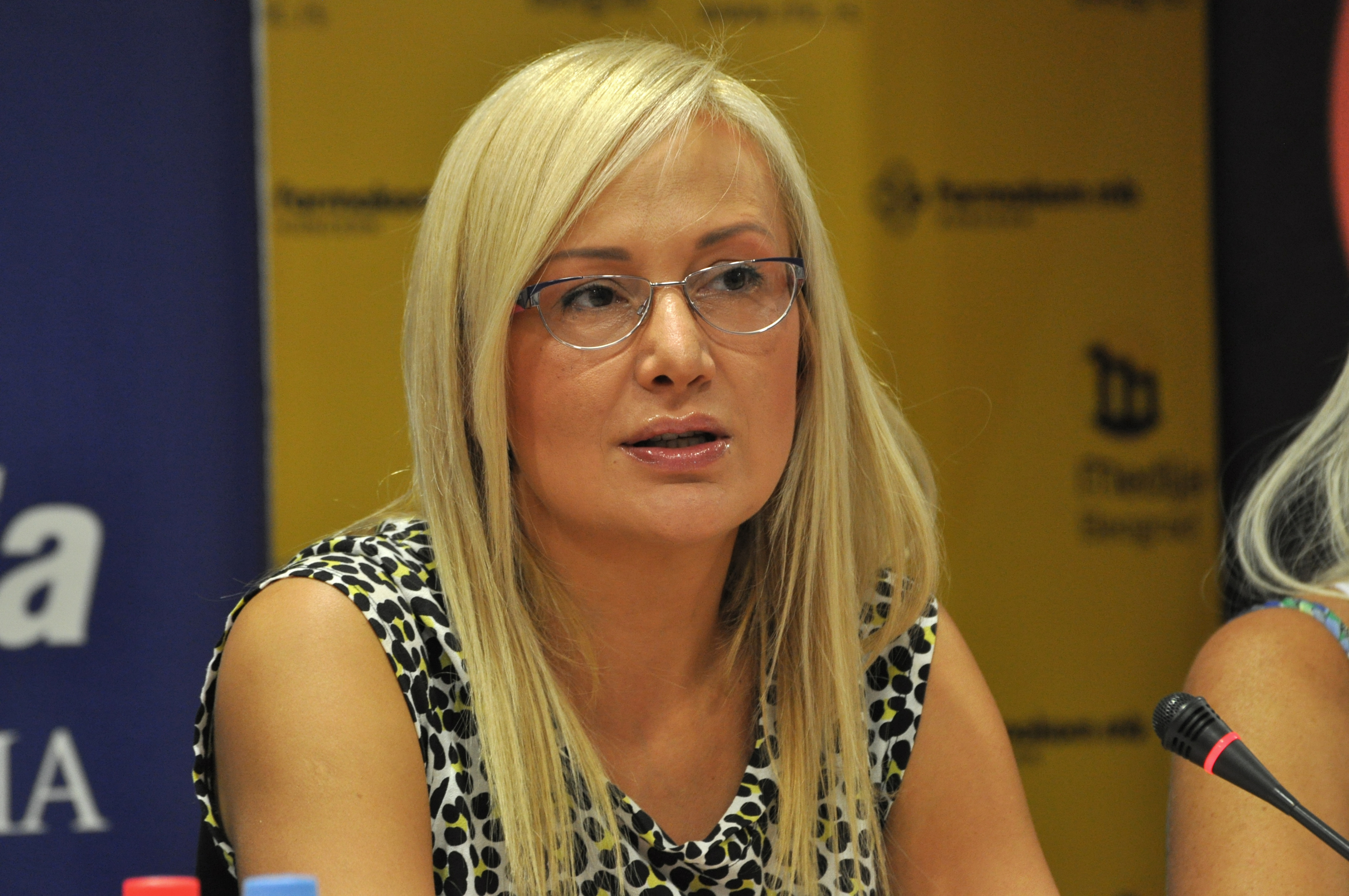 Леонтина Вукомановић